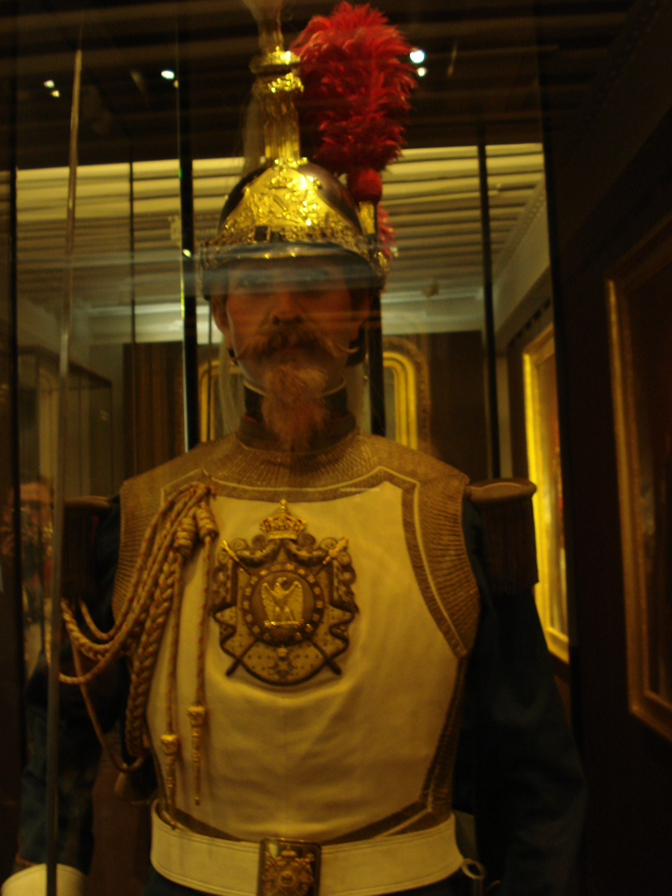 Uniforme d'intérieur (avec casaque en tissu plutôt que la cuirasse) d'un Cent-Garde